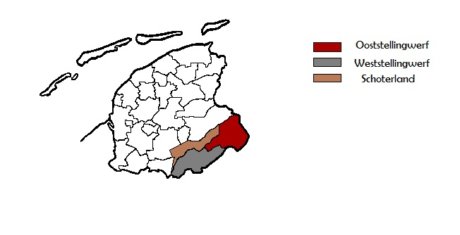 Reconstructie van de Grietenijen Stellingwerf-Oosteinde, Stellingwerf-Westeinde en Schoterland.